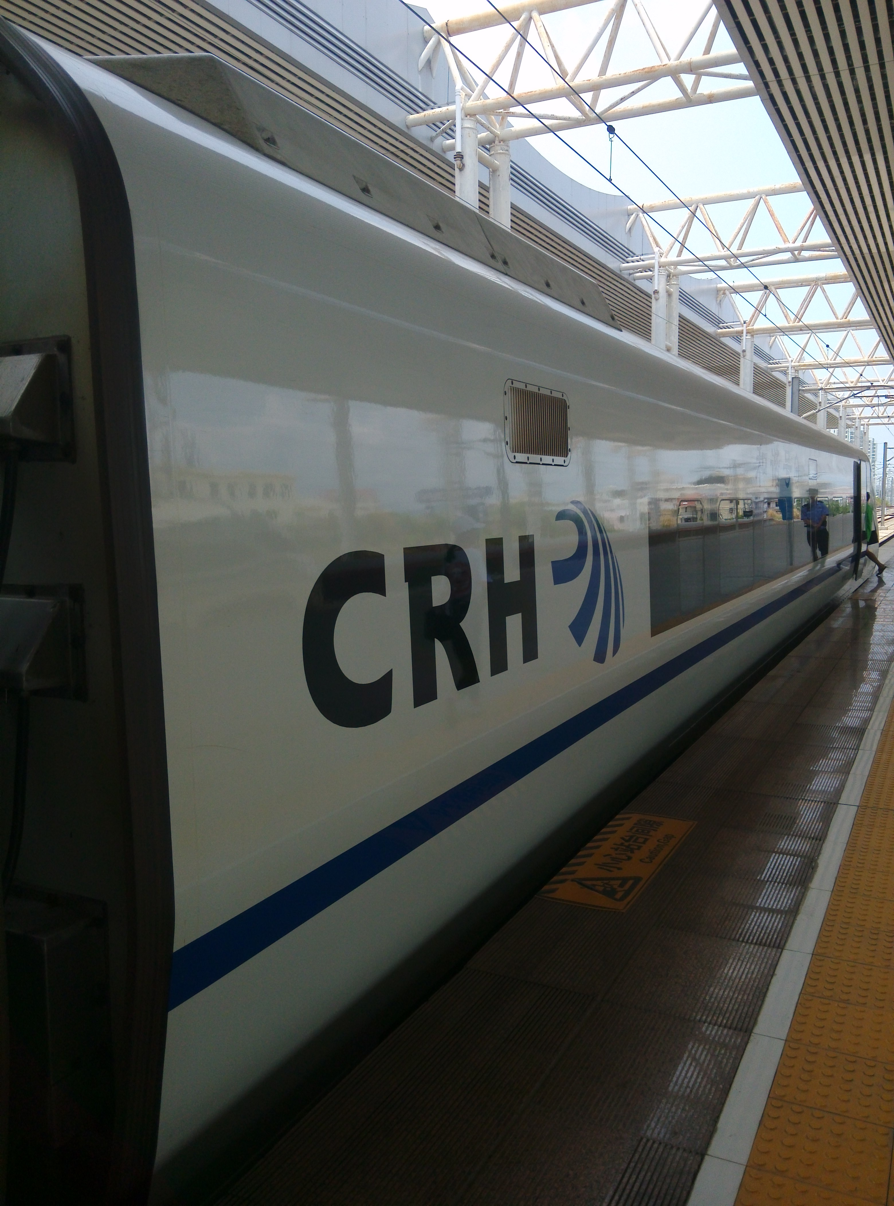 海南島三亜駅で発車を待つ西環線廻り海口行き高鉄。